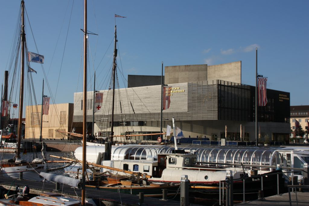 Das Auswandererhaus in Bremerhaven